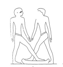 Keramikherstellung im Alten Ägypten nach einer Darstellung in einem Grab in Beni Hasan; Aufbereiten des Tons.